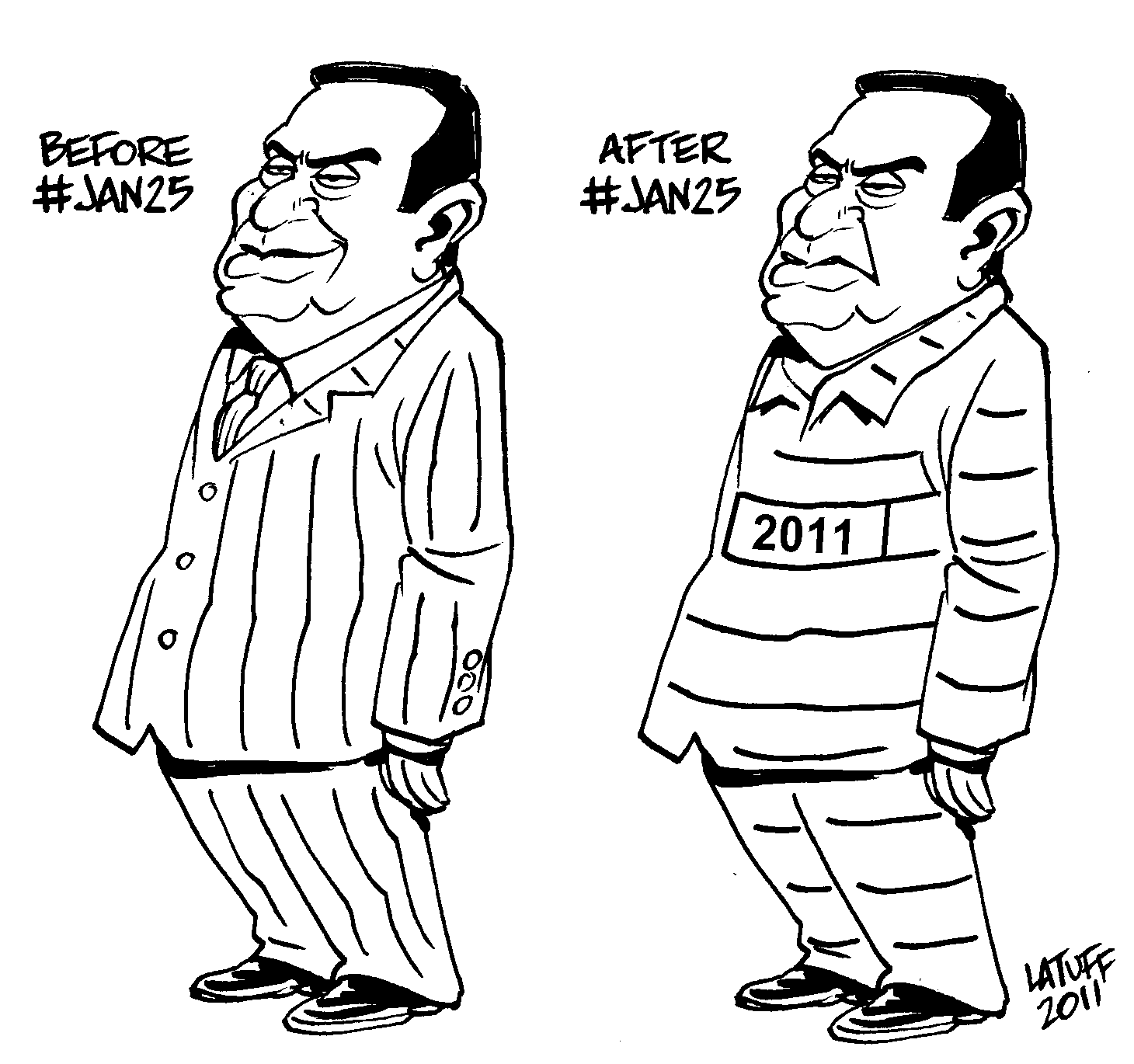 Mubarak before and after